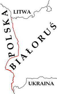 granica polsko-białoruska